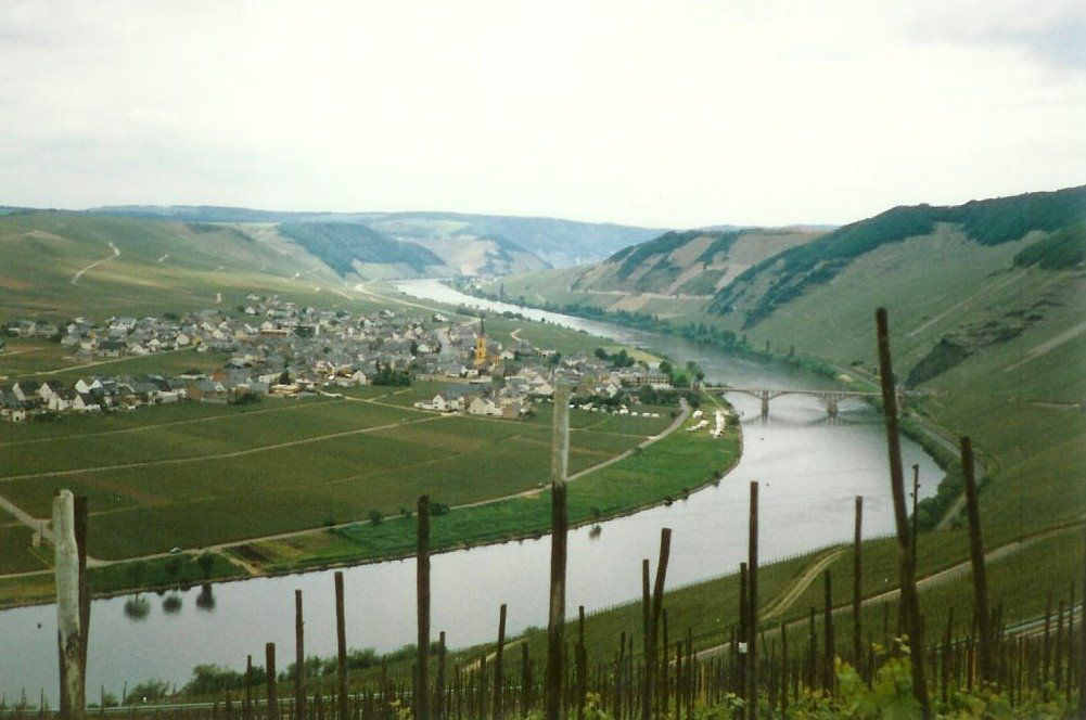 Mosel bei Trittenheim